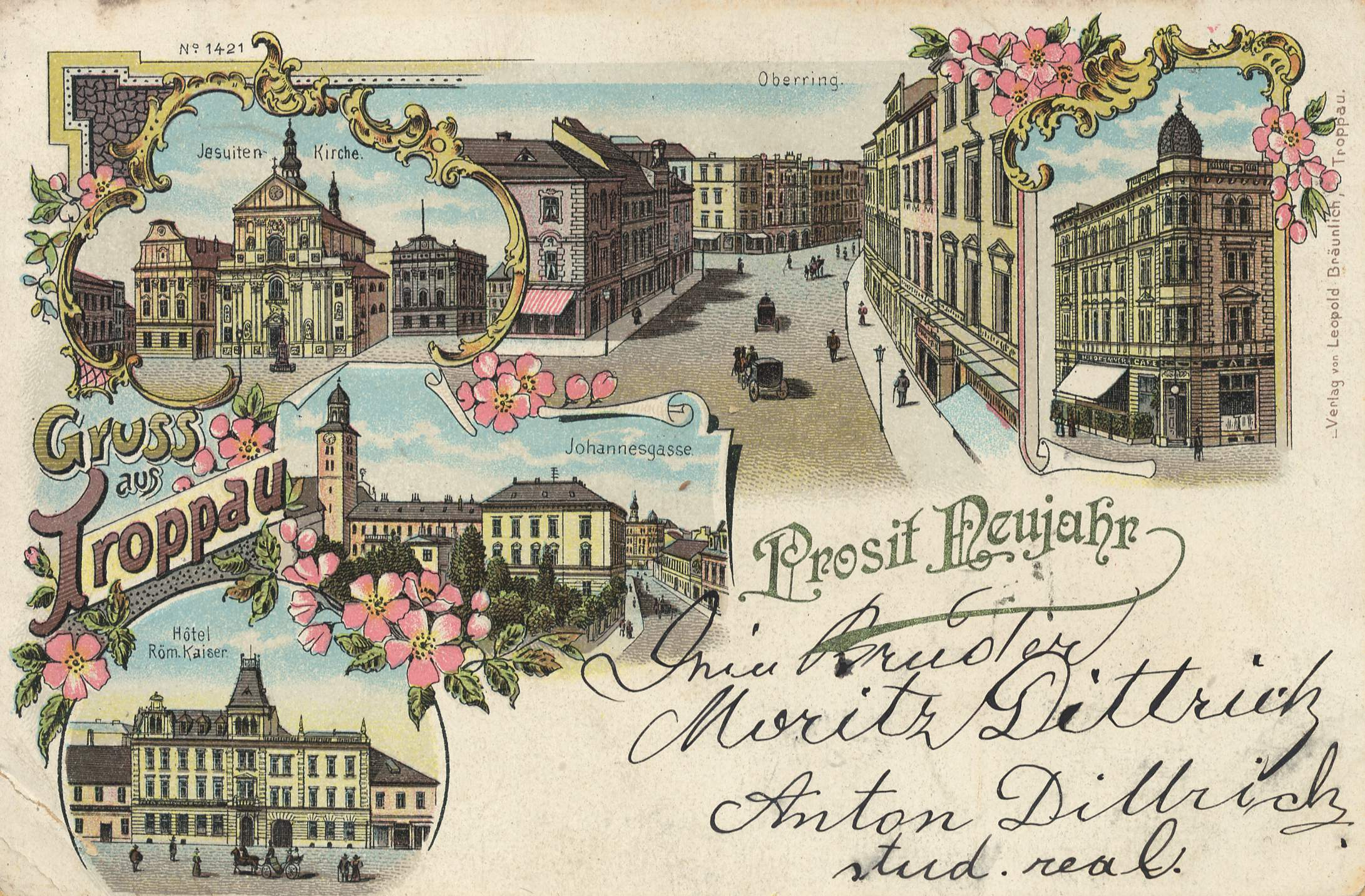 Jesuitenkirche; Oberring; Johannegasse; Hotel Römischer Kaiser